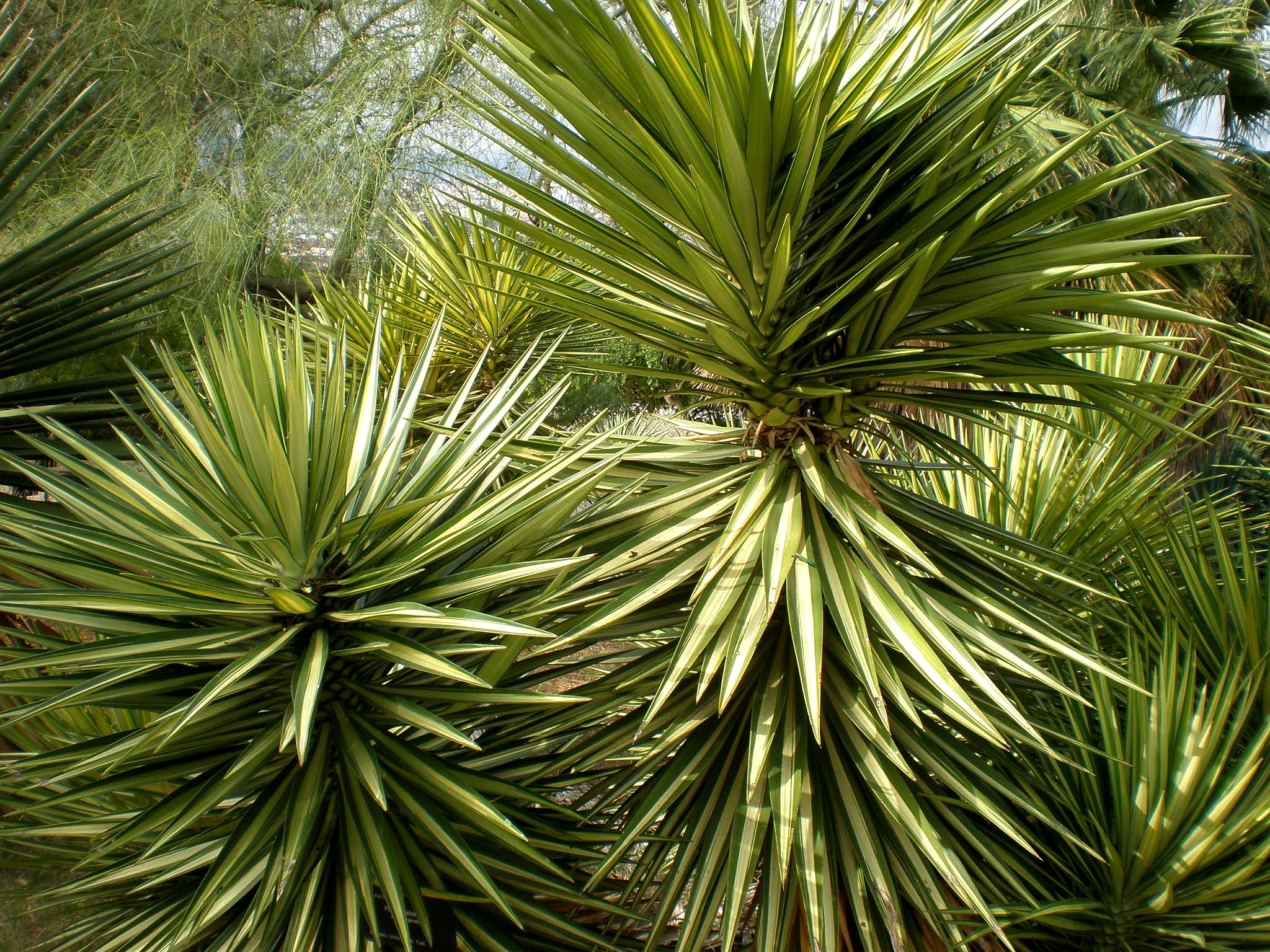 Jardín Botánico de Barcelona.